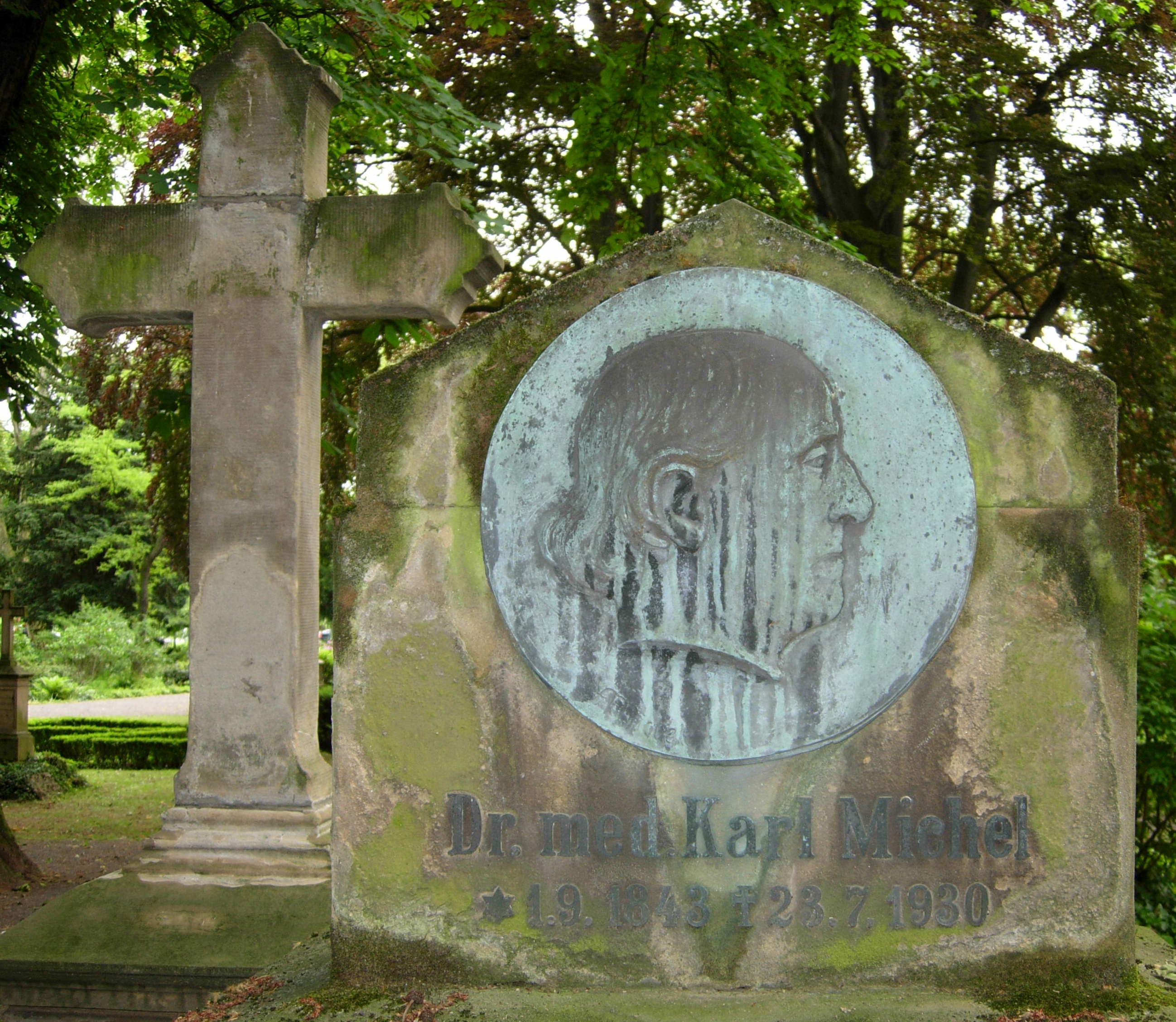 Bronze-Medaillon für den Arzt, Schauspieler, Fotografen und Schriftsteller Karl Michel auf dem Alten Friedhof Bonn